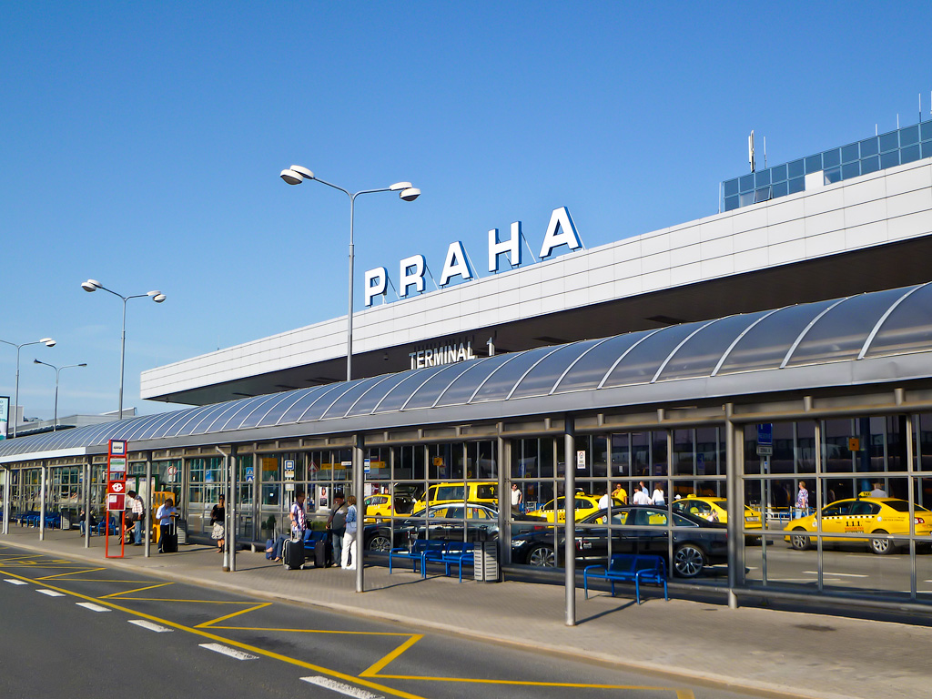 Терминал 1 аэропорта Рузине, Прага, Чешская республика